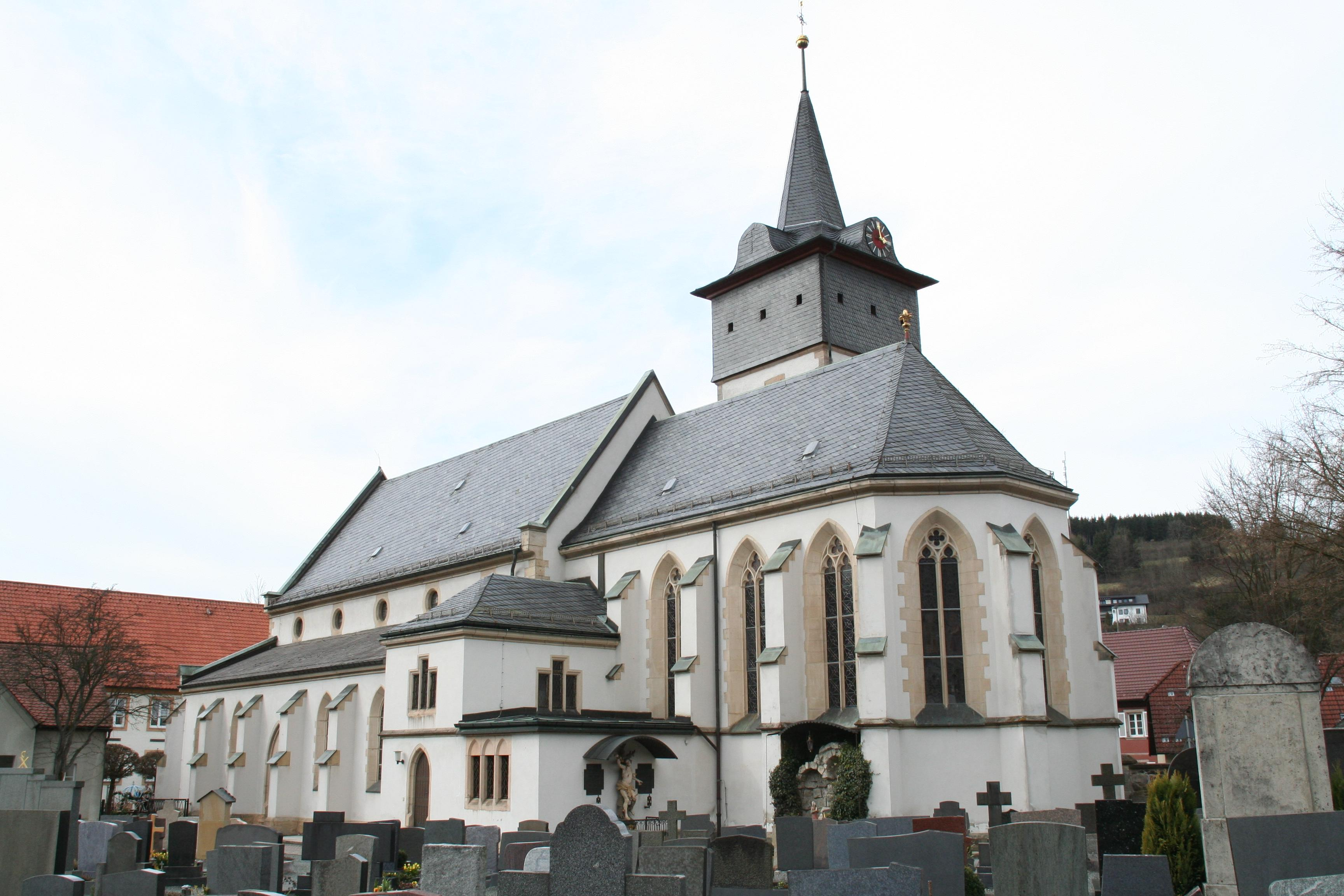 Steinwiesen im Landkreis Kronach, Katholische Kirche St. Marien